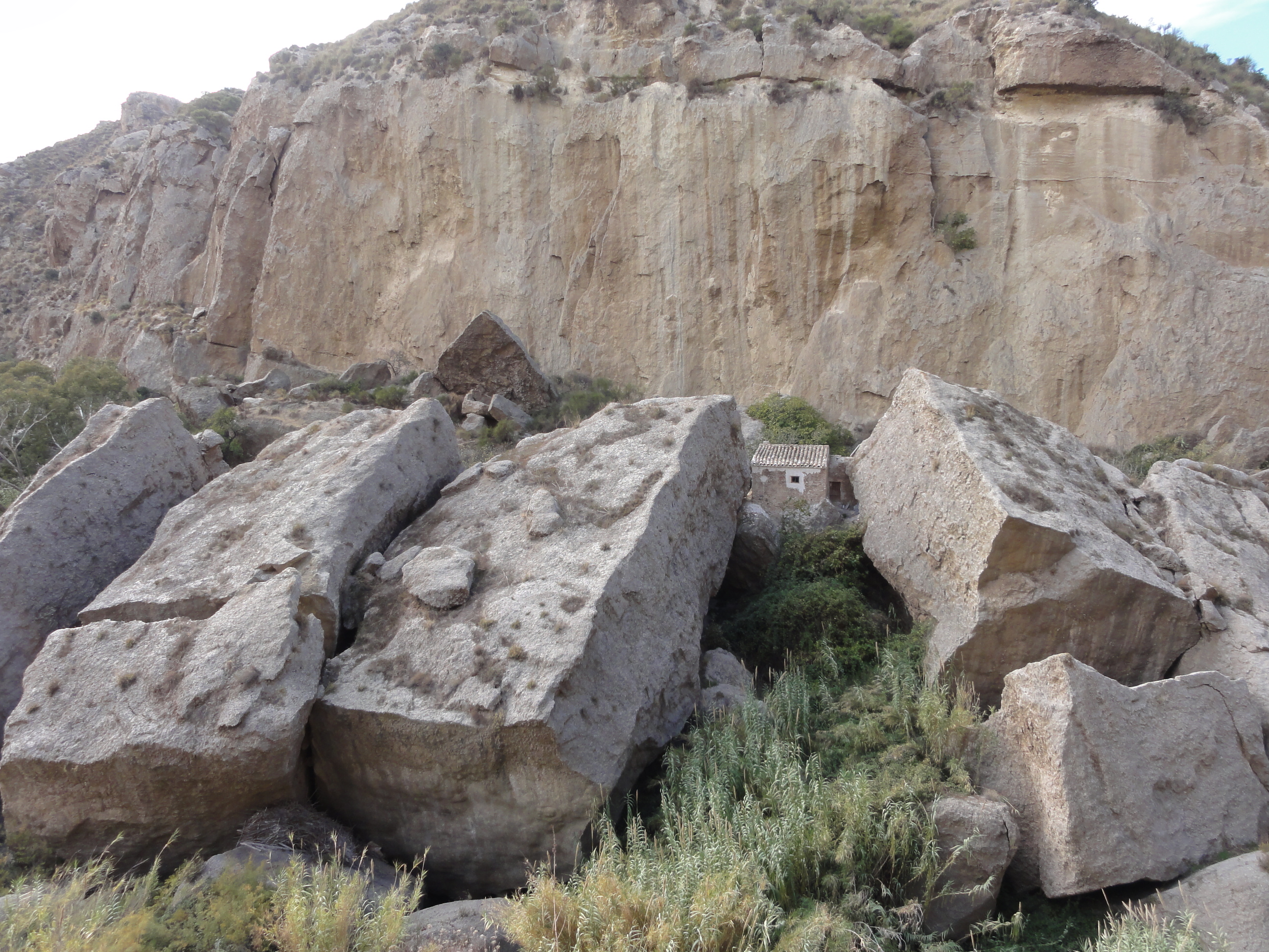 Yesos de Sorbas, unidad geológica constituida por cristales de sulfato cálcico precipitados durante la crisis salina del Messiniense This is a photography of a Special Area of Conservation in Spain with the ID: ES6110002. Natura2000 entry, EEA entry